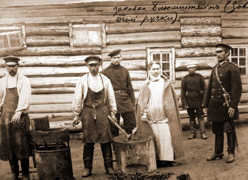 Сонька Золотая Ручка